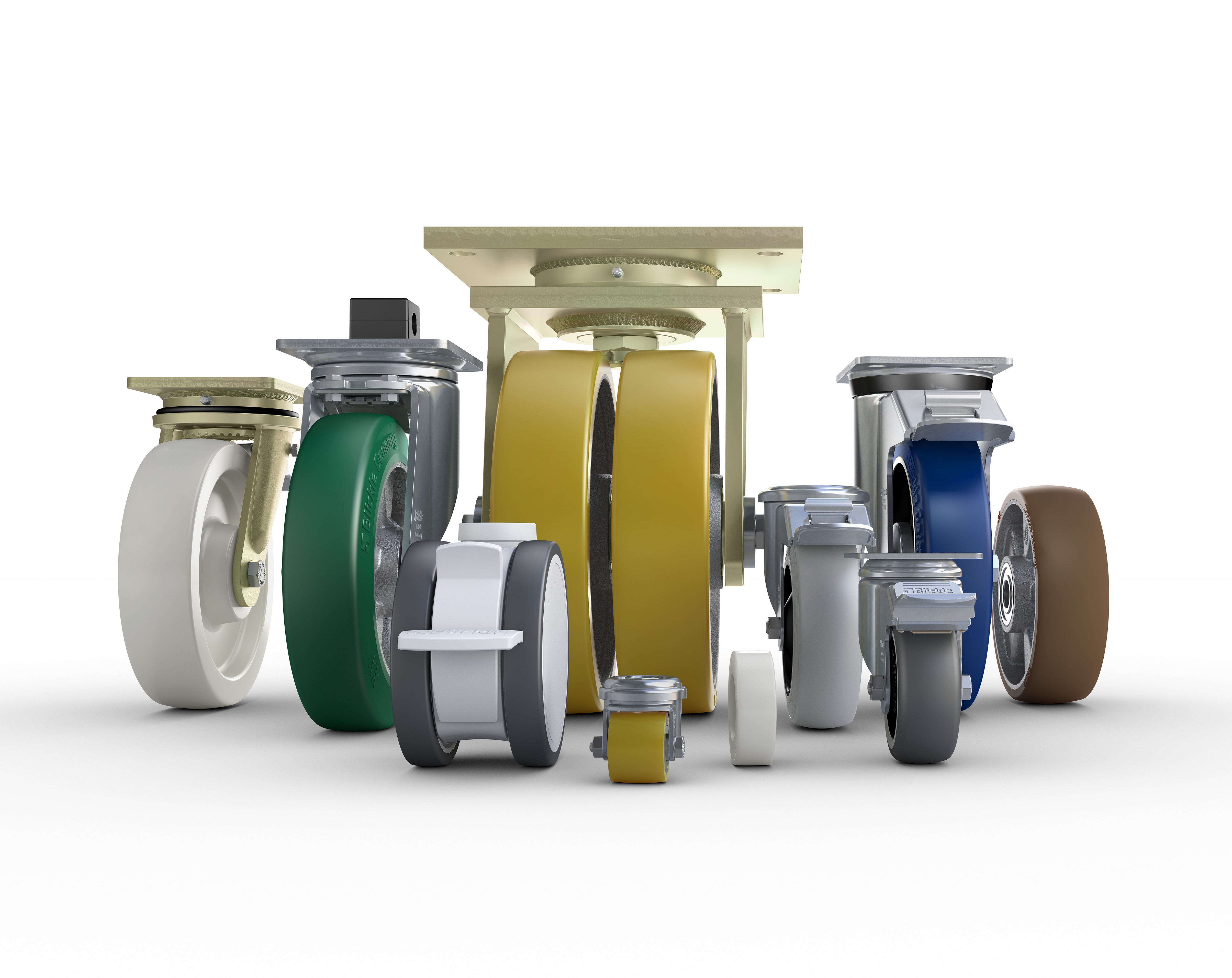 Das Produktportfolio von Blickle bietet Räder und Rollen in unterschiedlichen Größen und Varianten für verschiedenste Einsatzbereiche.